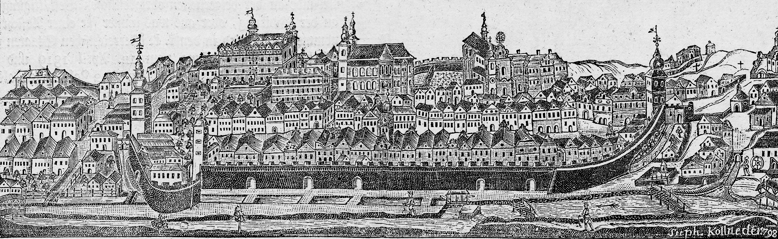 Veduta Litomyšle tištěná roku 1798 Štefanem Kohlnederem v Brně.